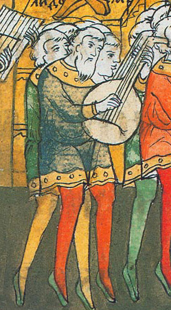 Музыканты, играющие на домрах. Давид-псалмопевец (фрагмент). Годуновская псалтирь. 1594